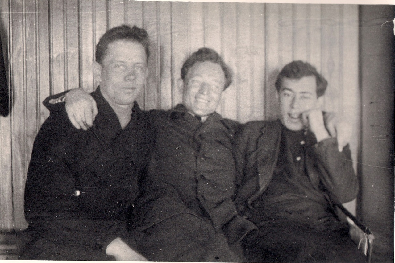 Беларуская (тарашкевіца): Зьлева направа: Аляксандар Кучынскі, Зьмітрок Паваротны, Юлі Таўбін.